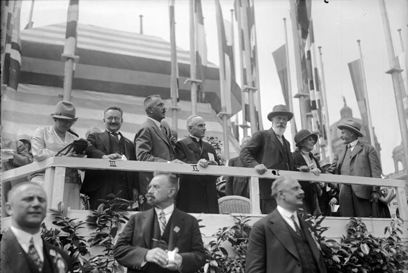 Der Riesenfestzug des 10. deutschen Sängerbund-Festes in Wien. 200.000 deutsche Sänger zogen durch die Strassen Wiens. Aufnahmen unseres nach Wien entsandten Sonder-Bild-Berichterstatters! Die Tribüne mit den Ehrengästen: I. der österreichische Bundespräsident Dr. Hainisch, II. der österreichische Ministerpräsident Seipel, III. der deutsche Reichstagspräsident Löbe, während des Festzuges.